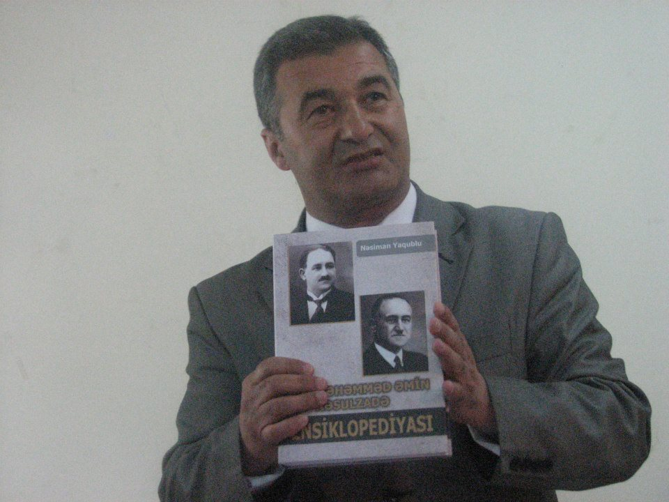 Nəsiman Yaqublu, “M.Ə.Rəsulzadə Ensiklopediyası”nın təqdimatı